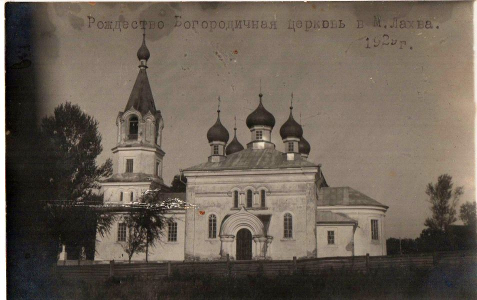 Беларуская (тарашкевіца): Лахва (Лахва). Царква-мураўёўка